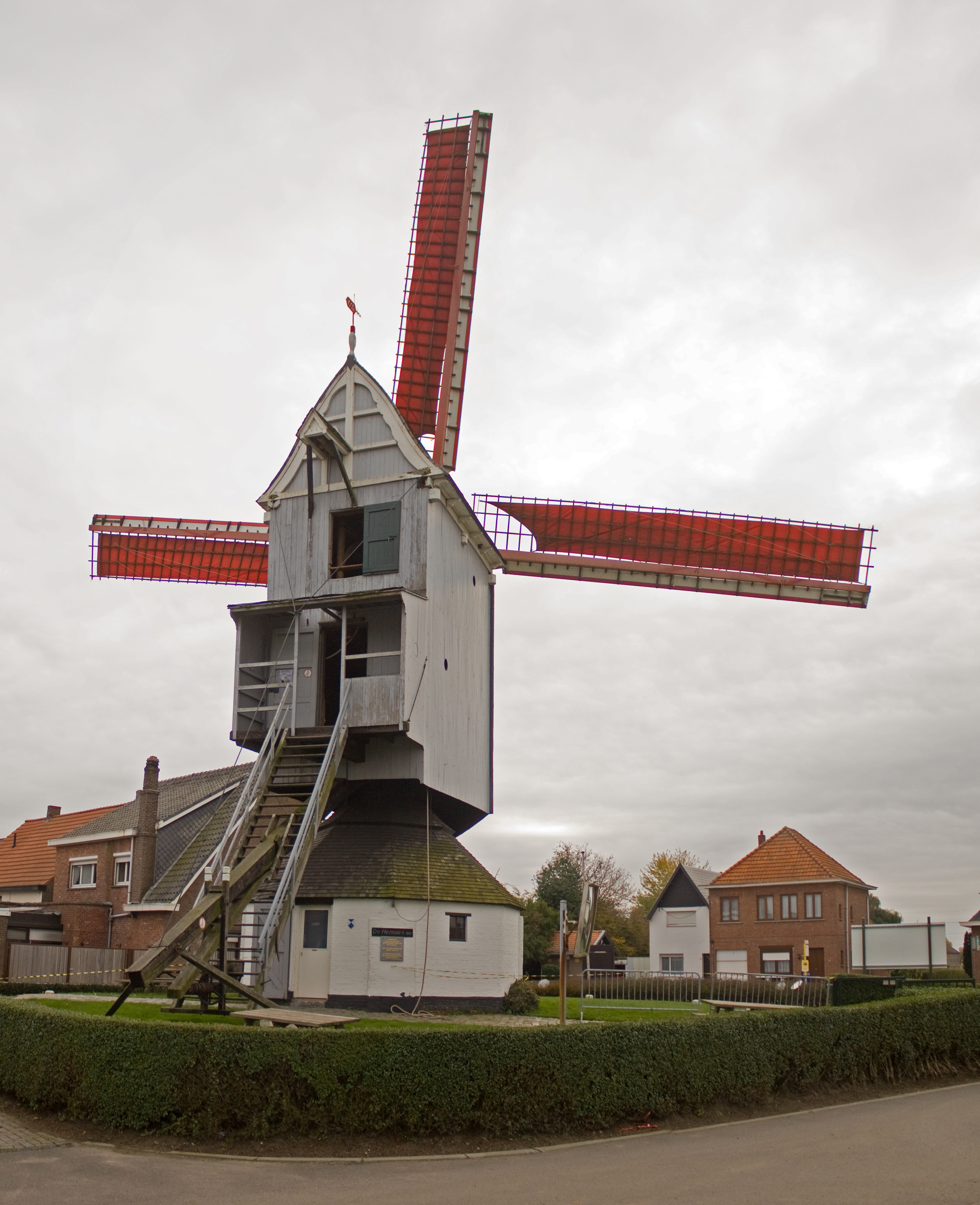 De Heimolen te Aartselaar